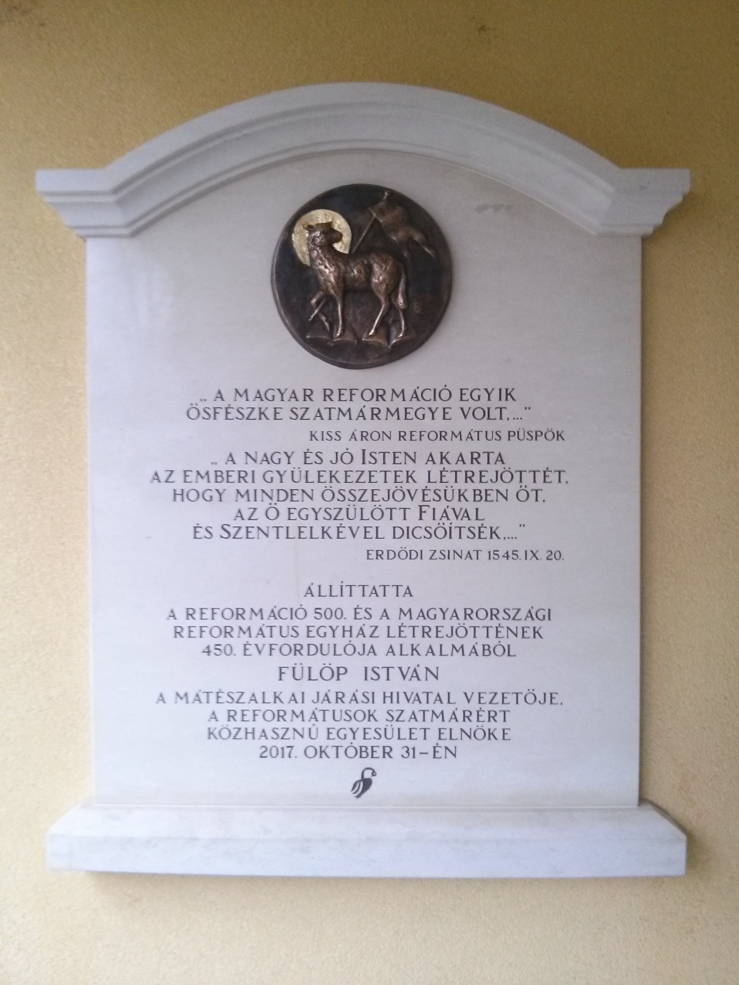 Bíró Lajos szobrászművész alkotása. Fülöp István Járási Hivatalvezető, a Reformátusok Szatmárért Közhasznú Egyesület elnökének adománya a helyi Kálvin János Református Általános Iskola részére